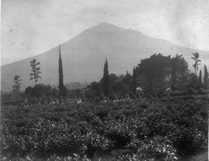 Foto. Panen daun teh di perkebunan teh di Cikajang.